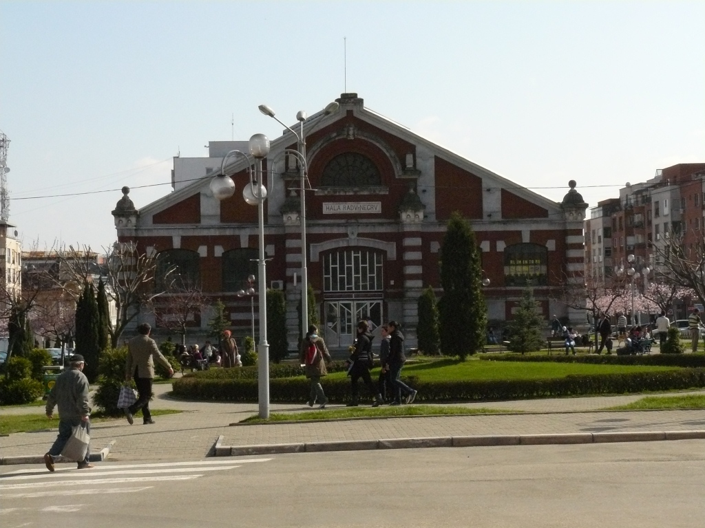 Hala Radu Negru (HALA RADV NEGRV)